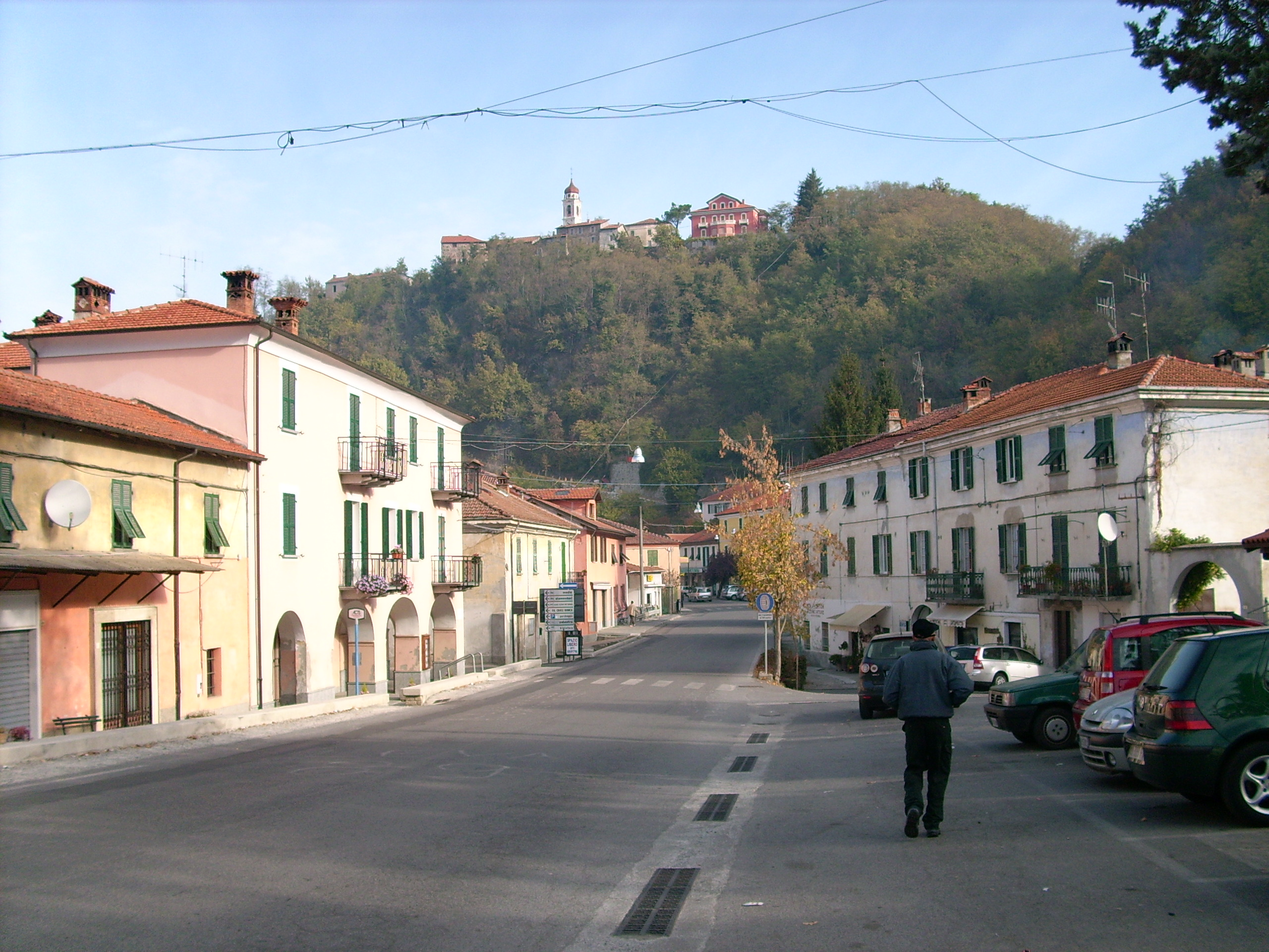 Dego, Liguria, Italia